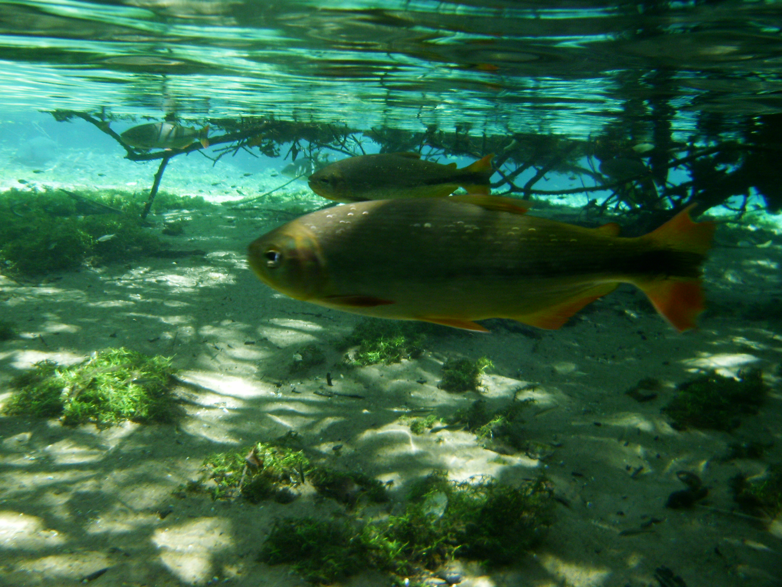 Peixe Dourado posando para foto no Rio da Prata - MS